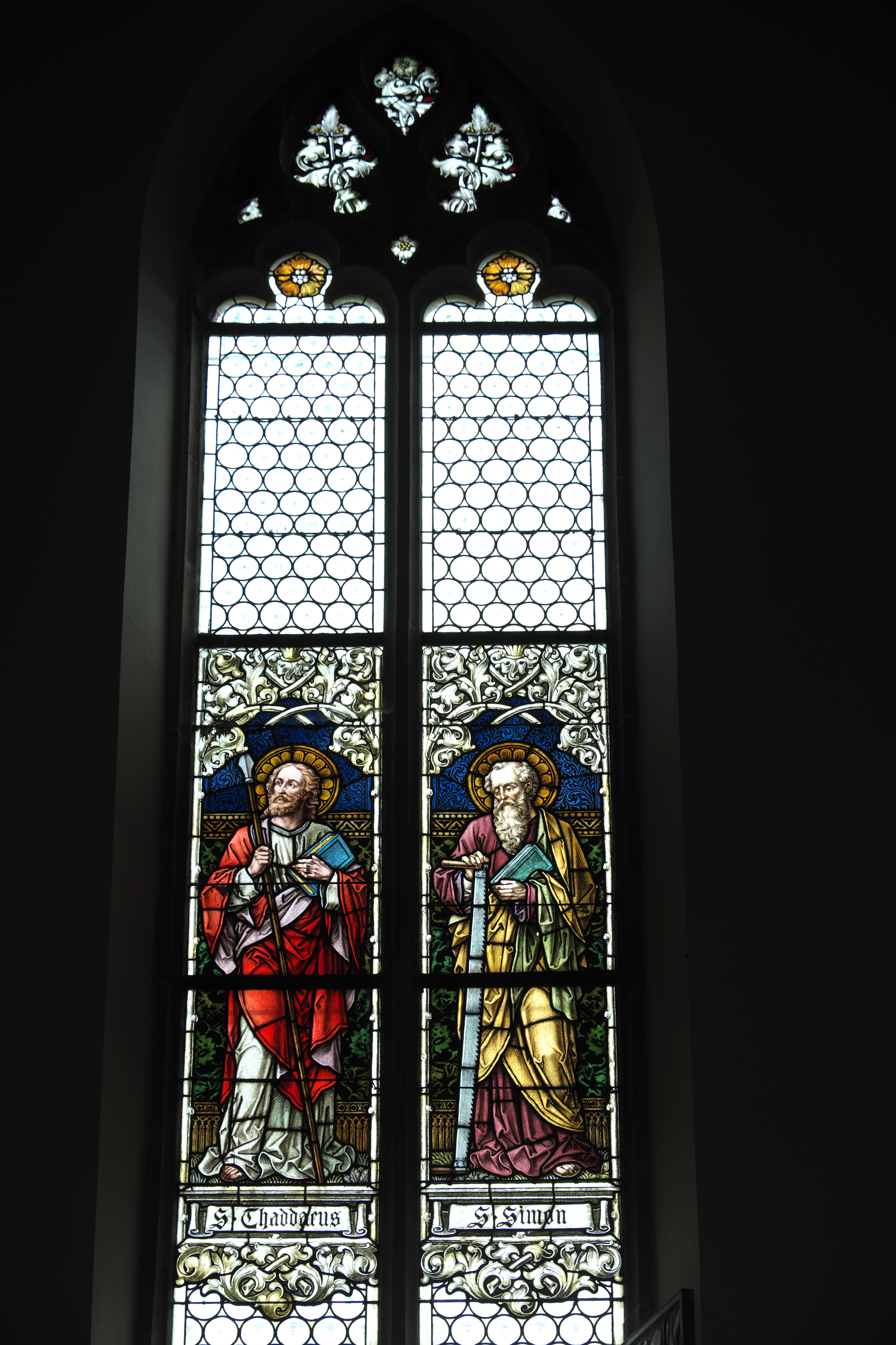 Kirche Saint-Bernard de Menthon in Ferrette (Pfirt) im Département Haut-Rhin (Elsass/Frankreich), Bleiglasfenster von den Gebrüdern Ott (Ott Frères), von 1913, Darstellung: Apostel Thaddäus und Simon